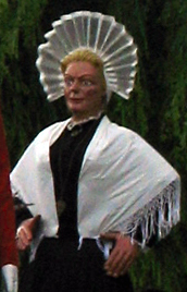 Ham (Somme, France) - Animation festive au centre-ville, un dimanche de printemps. Le géant Zabelle descendant la rue du Château pour rejoindre la rue de Noyon. .